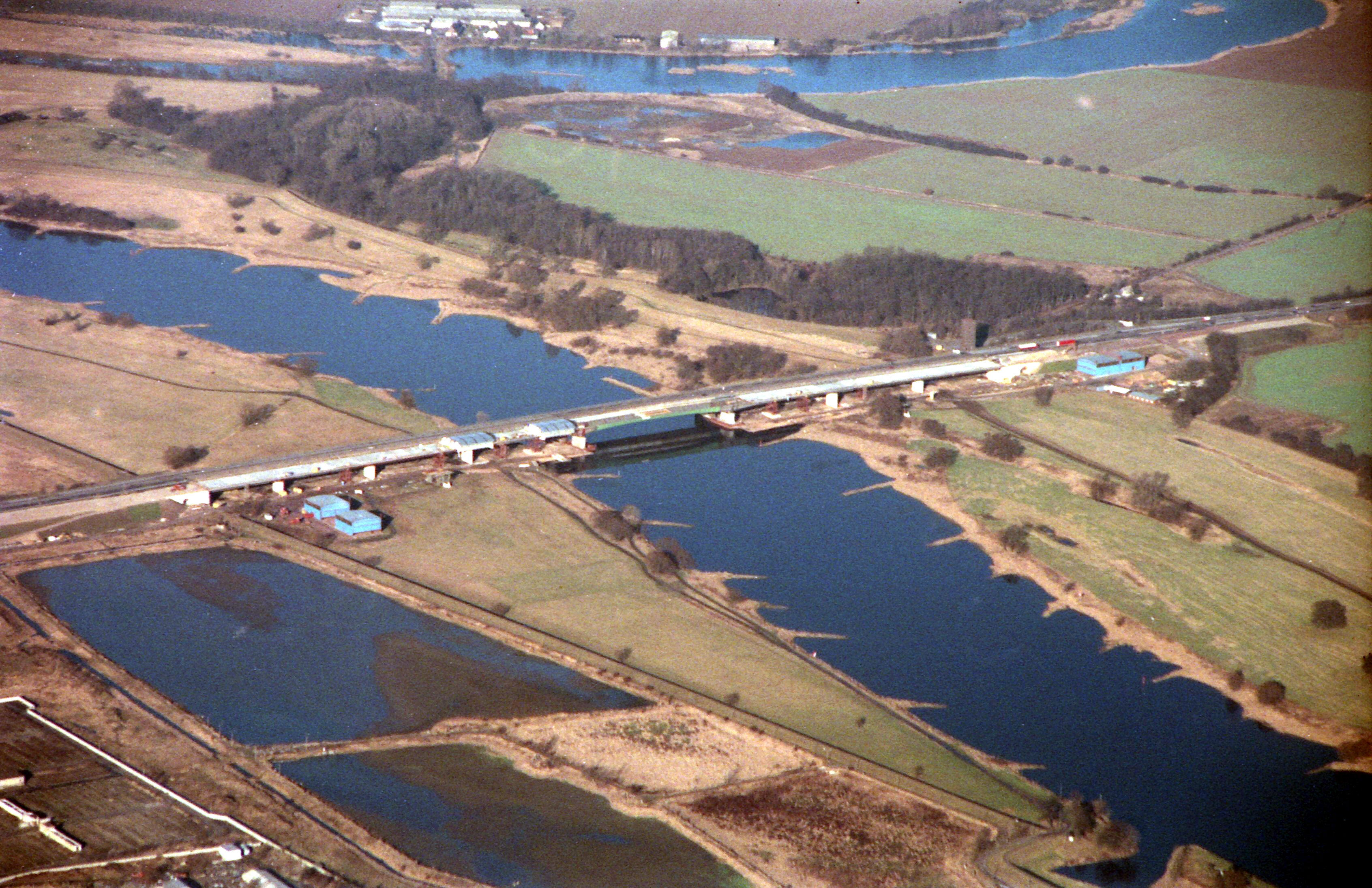 Vockerode, Neubau der Elbebrücke (Bundesautobahn A9)